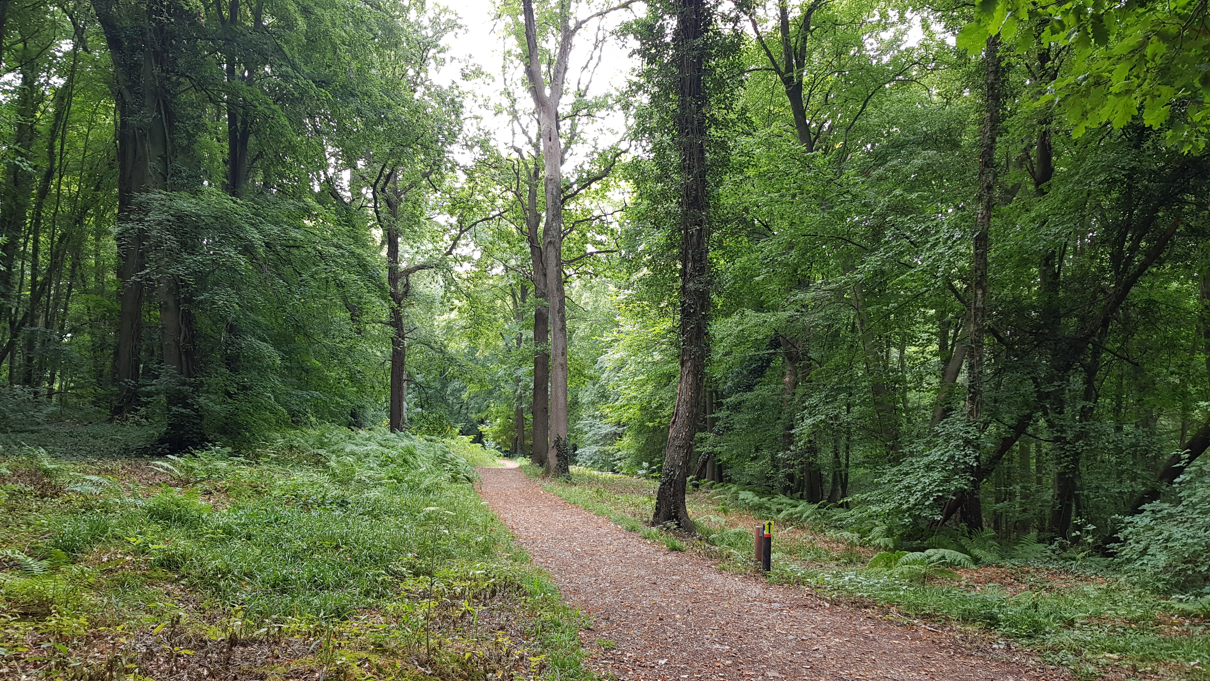 bospad met linden in Savelsbos, Rijckholt, Nederland